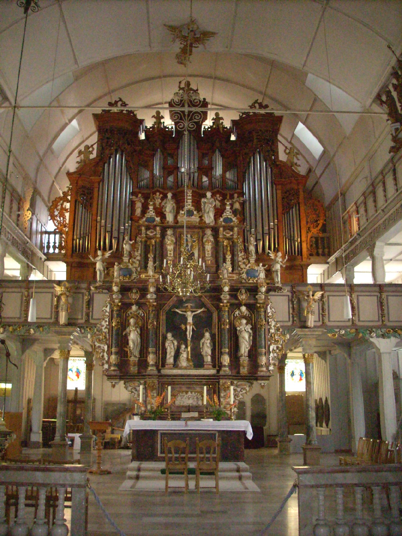 Marktkirche zum Hl. Geist, Clausthal, Altar